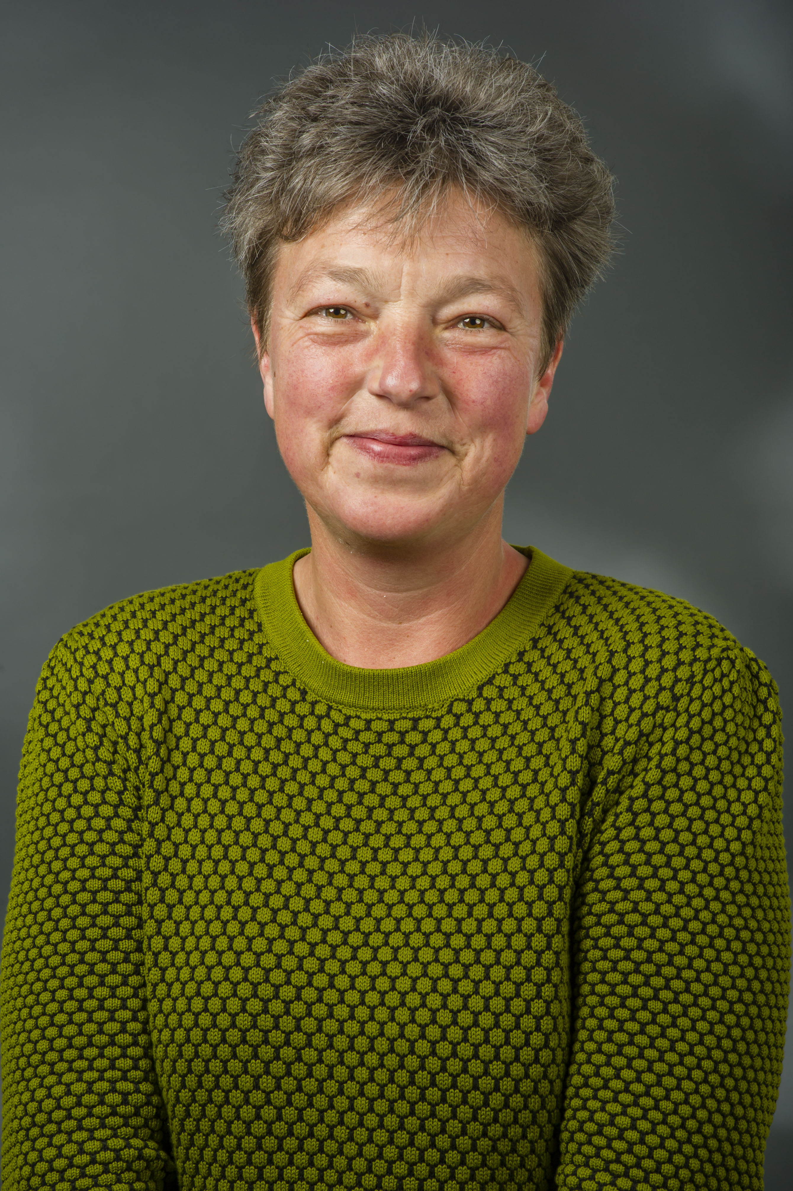 Hanna Naber